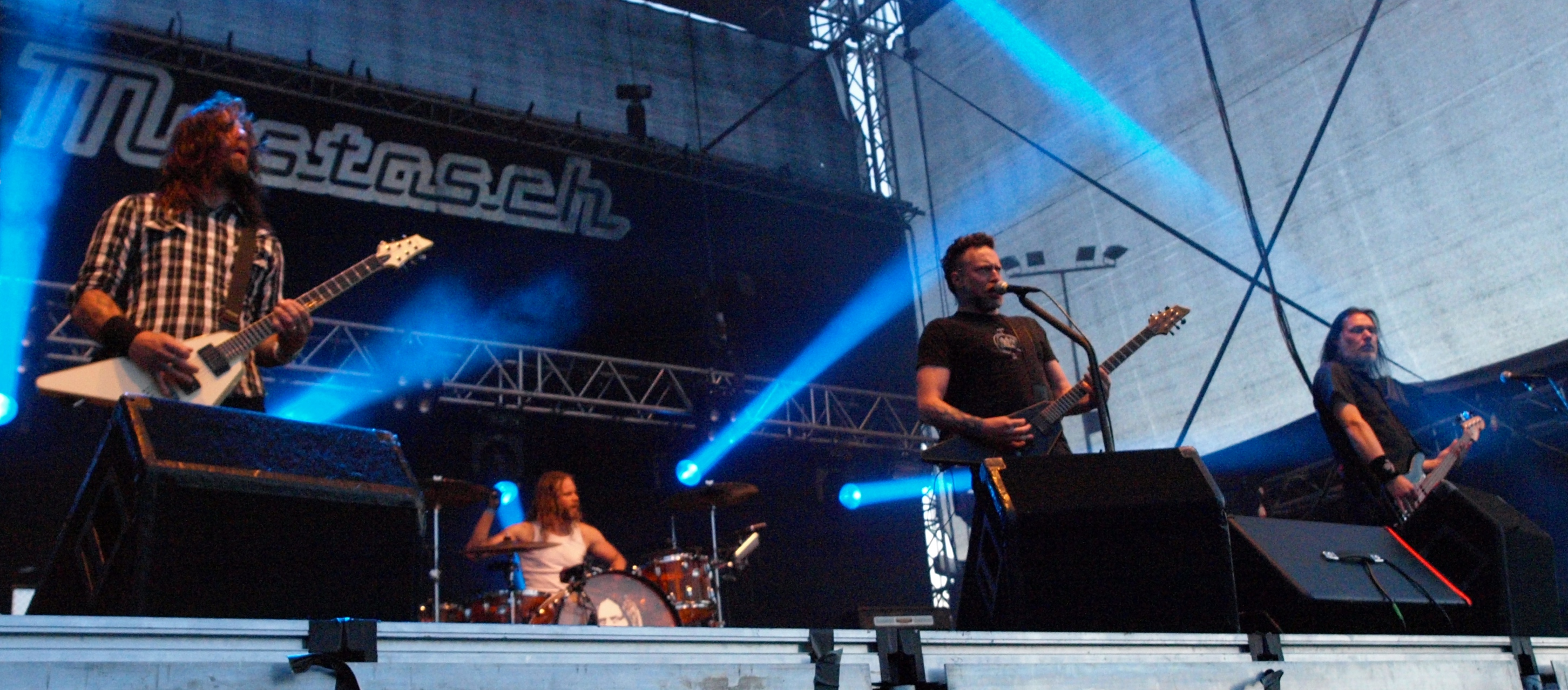 Mustasch live am Myötätuulirock 2011